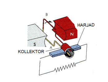 Alalisvoolu generaatori ehitus